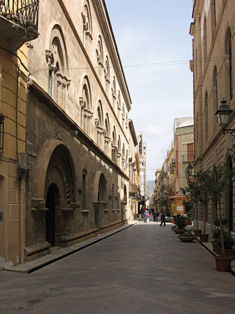 Via Garibaldi in Trapani, Blickrichtung Ostnordost